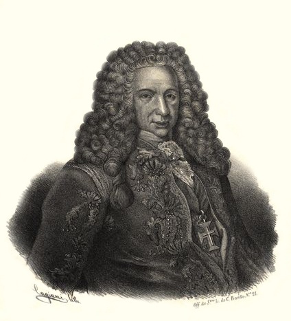 Luís da Cunha (1662-1740), diplomata português.